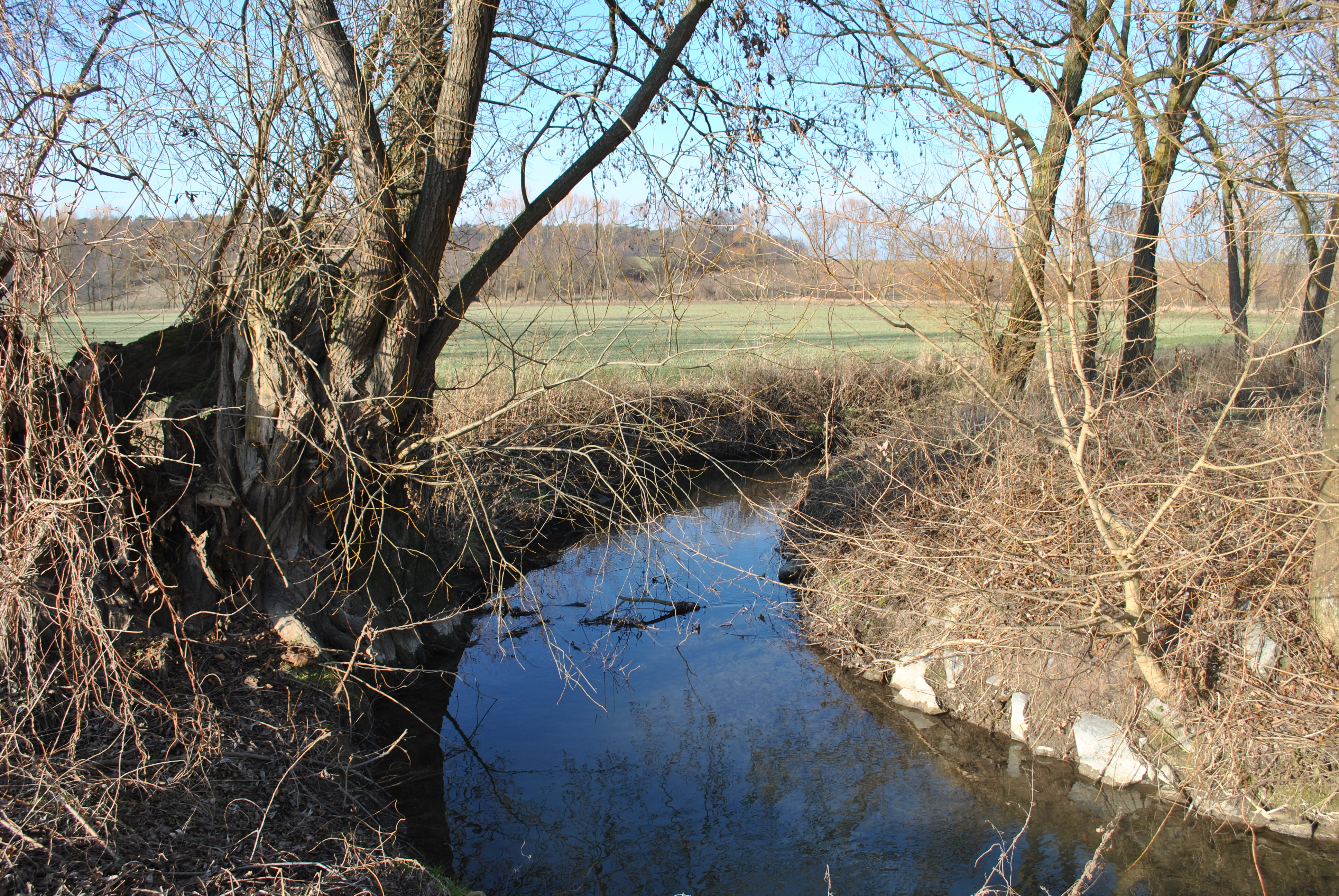 Castellbachzufluss Gründleinsbach zwischen Castell und Rüdenhausen, bei Pulvermühle (Rüdenhausen)